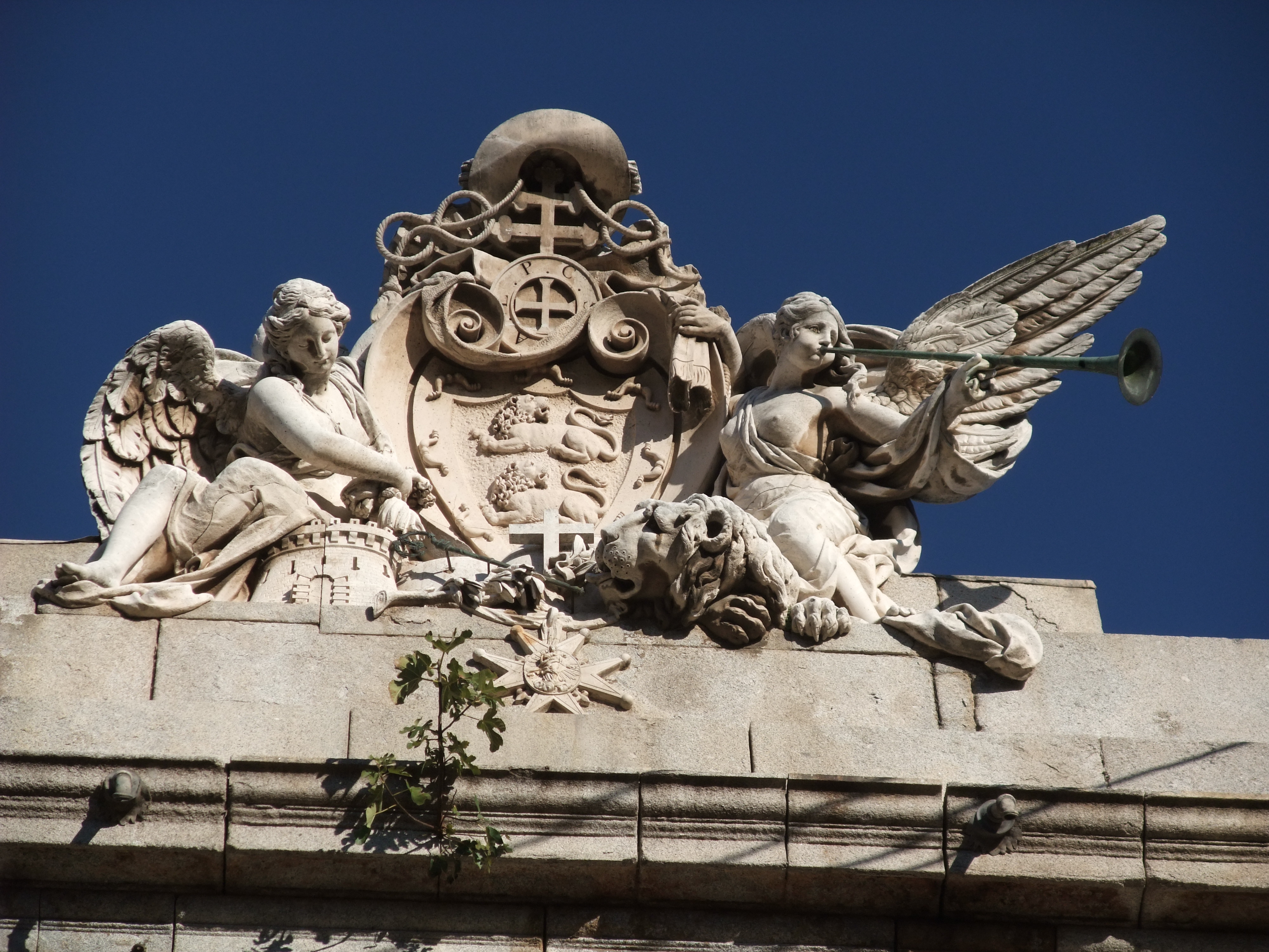 Toledo-Palacio Universitario Lorenzana